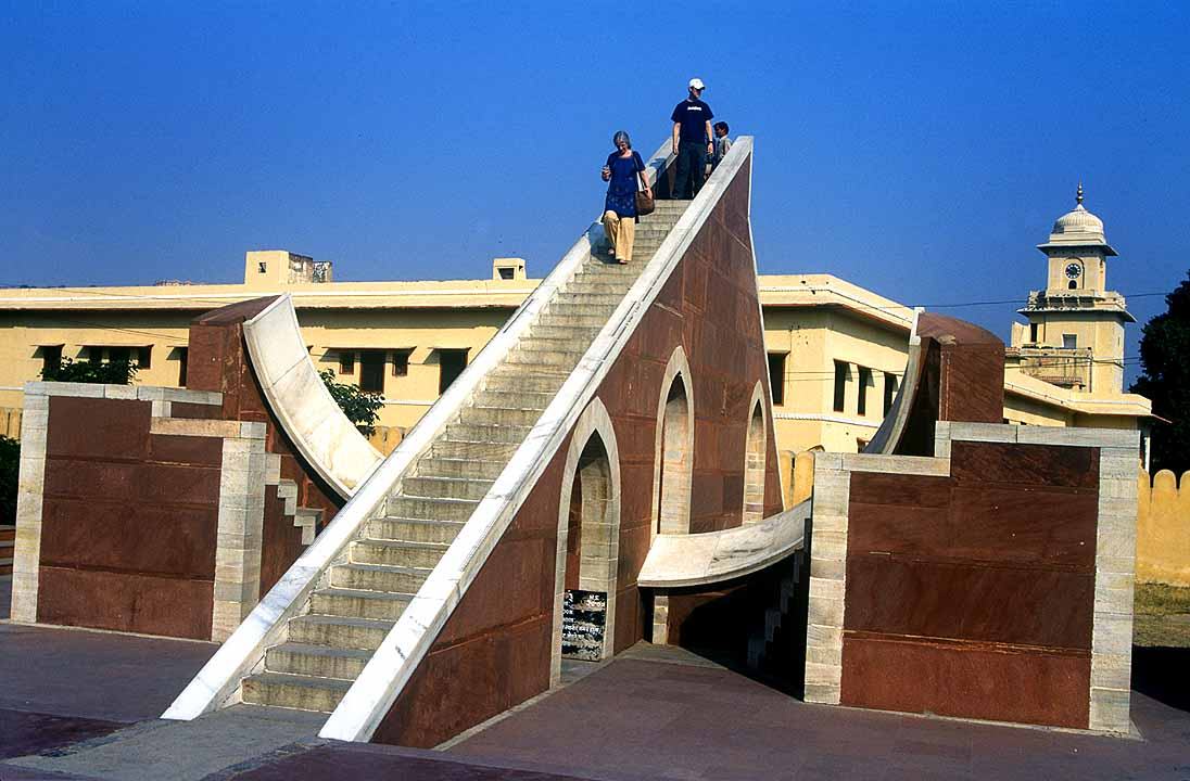 Jaipur - Jantar Mantar - Laghu Samrat Yantra